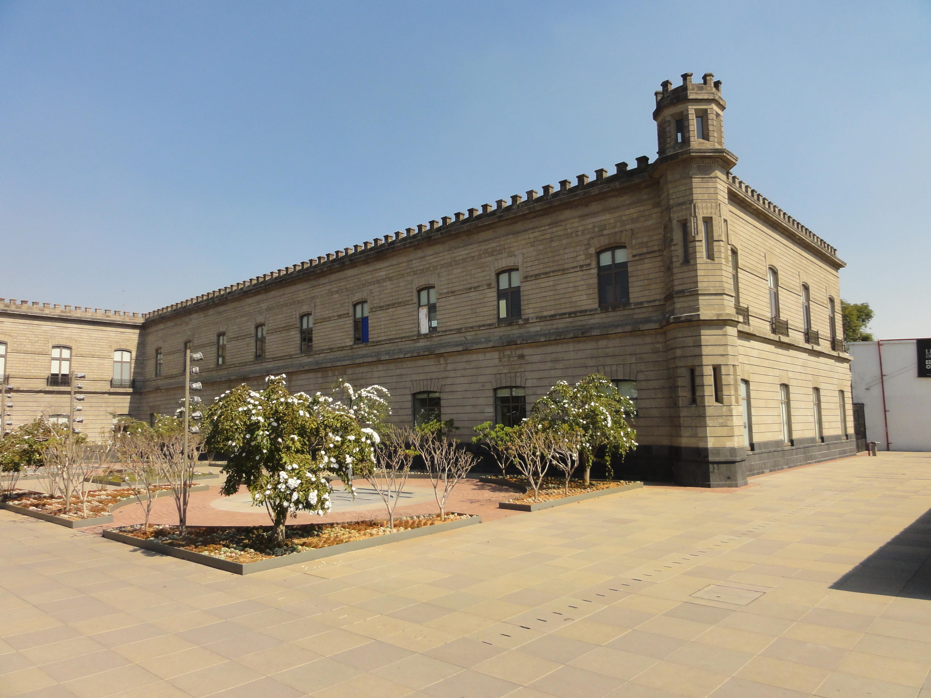 La antigua cárcel de Lecumberri como archivo de la nación